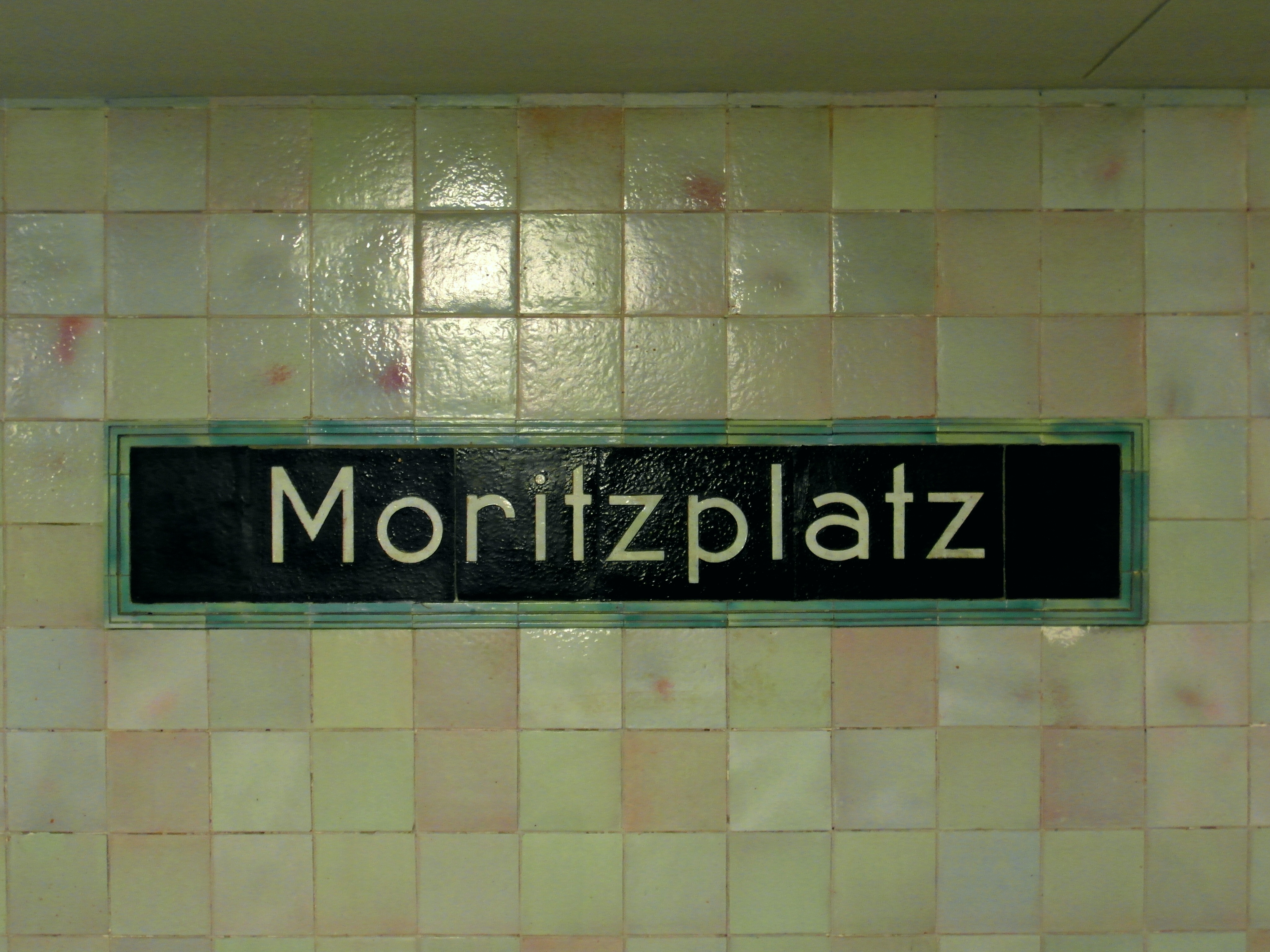 Linie U8